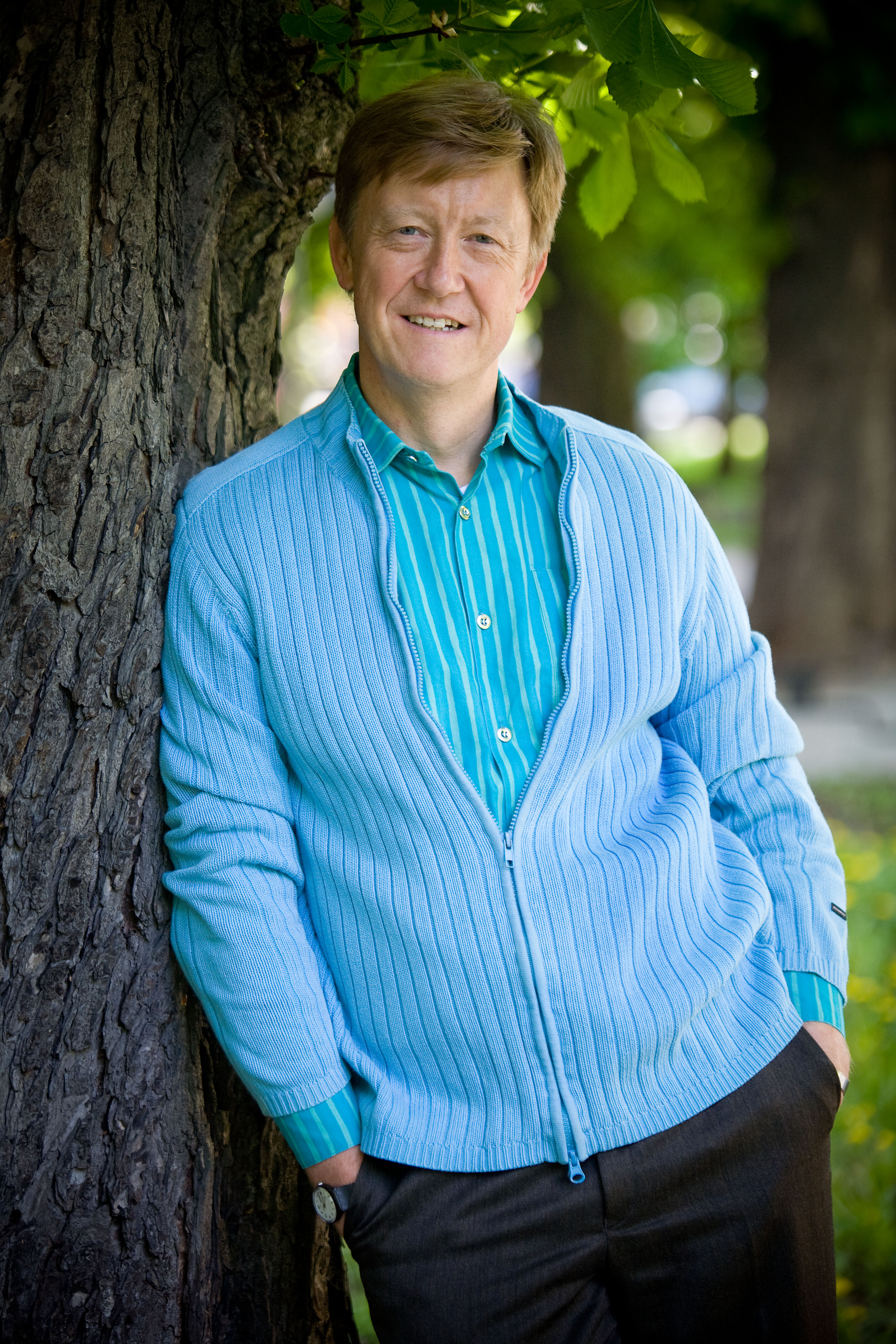 Miljöminister Andreas Carlgren i kofta, lutad mot ett träd. Foto: Victor Brott